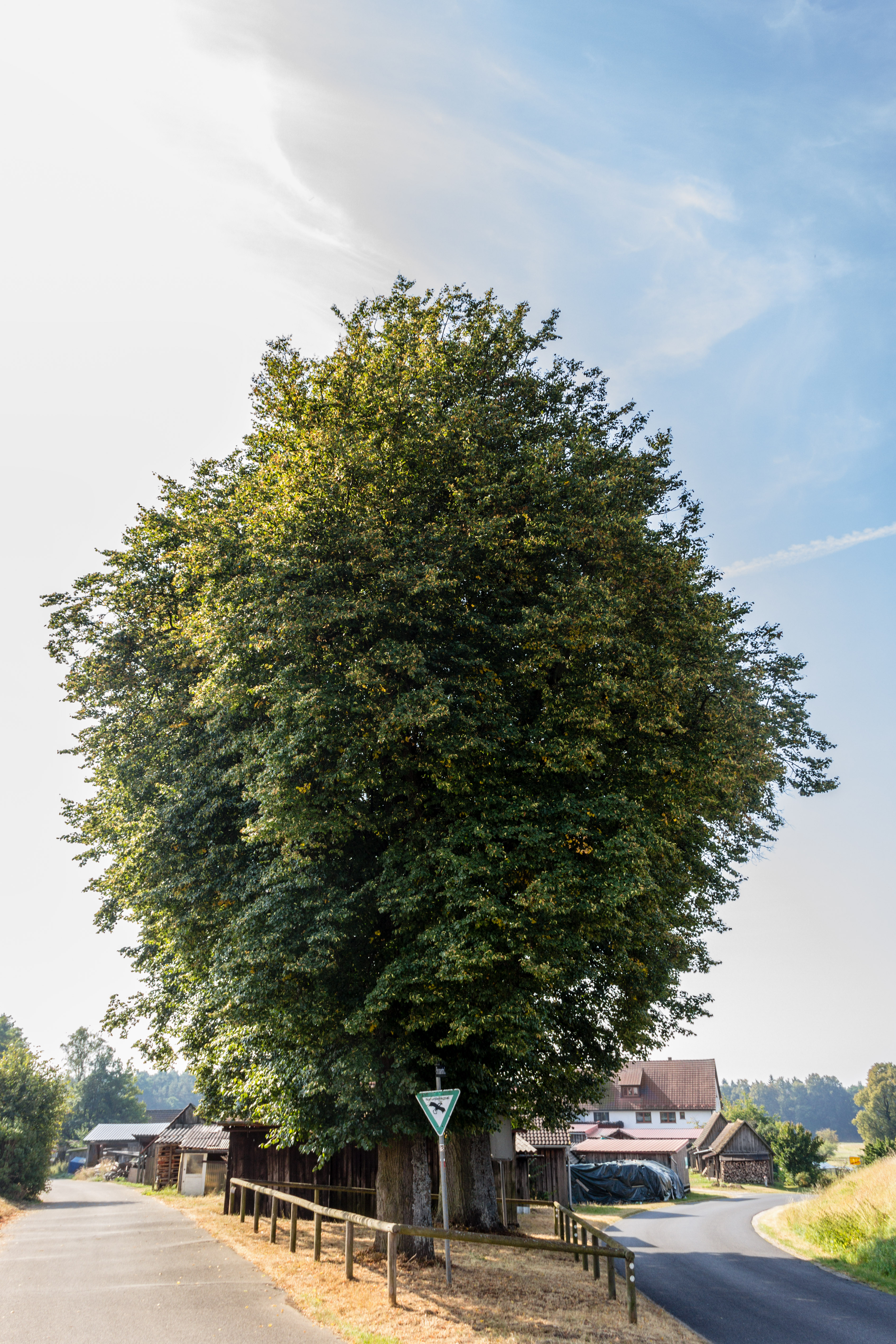 Holzplatzlinden, Leinburg, Naturdenkmal Update 14.09.2019: die hintere Linde wurde gefällt